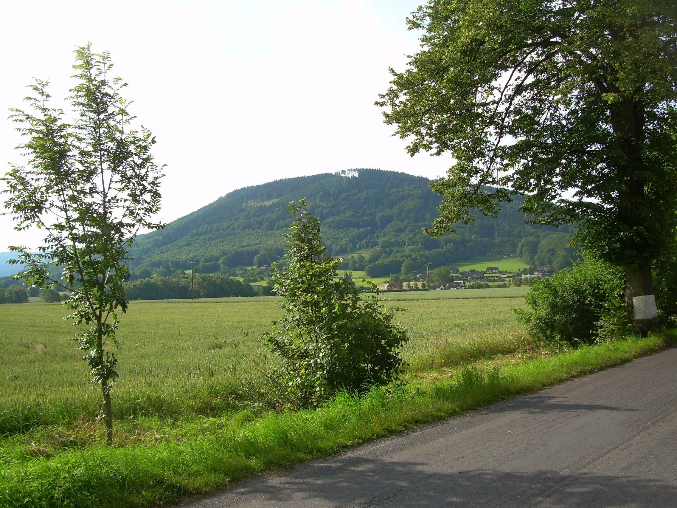 Hora Godula (737 m) pohledem ze silnice z Hnojníka do Komorní Lhotky